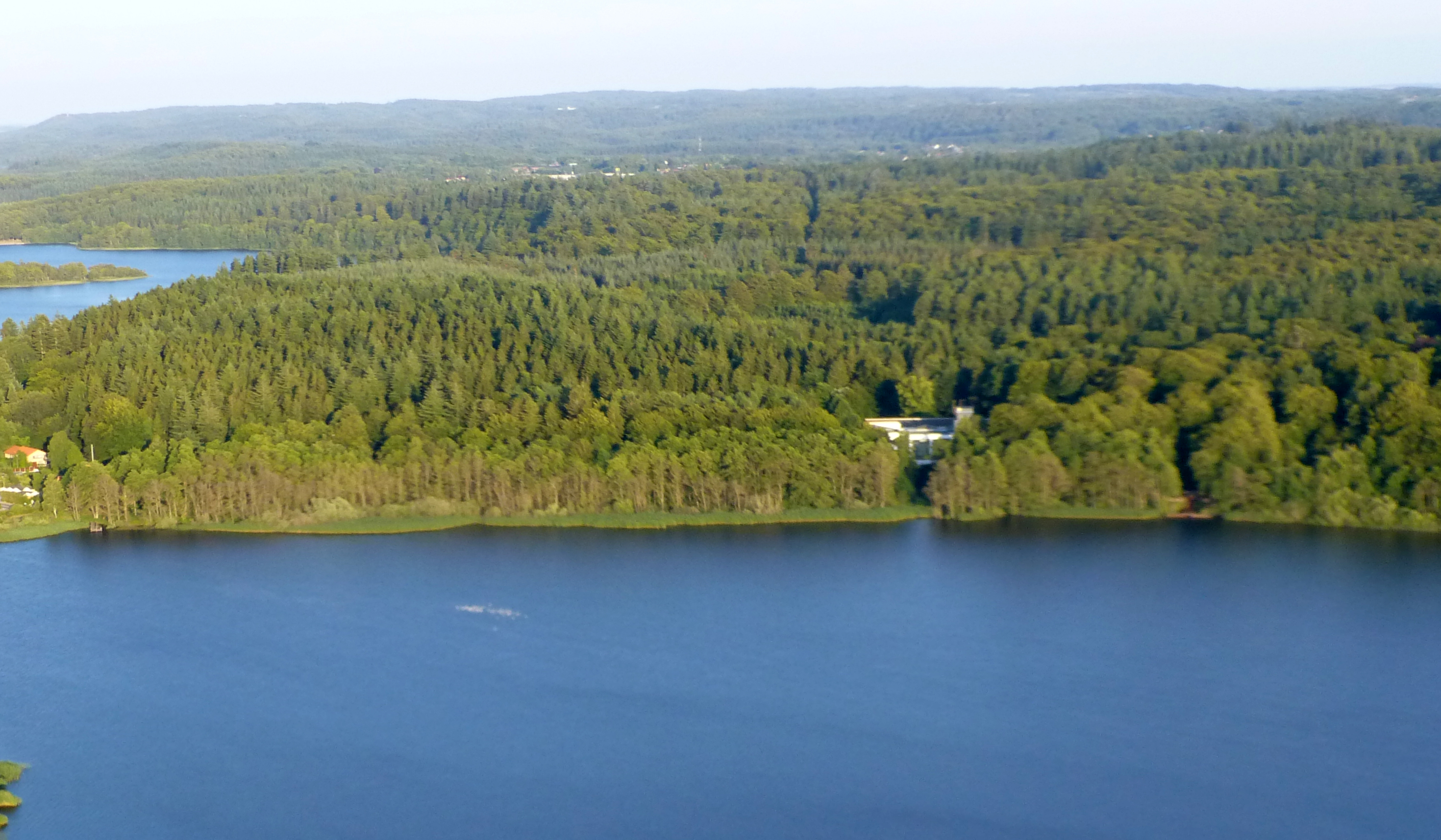 Silkeborg Vesterskov med Ørnsø i forgrunden